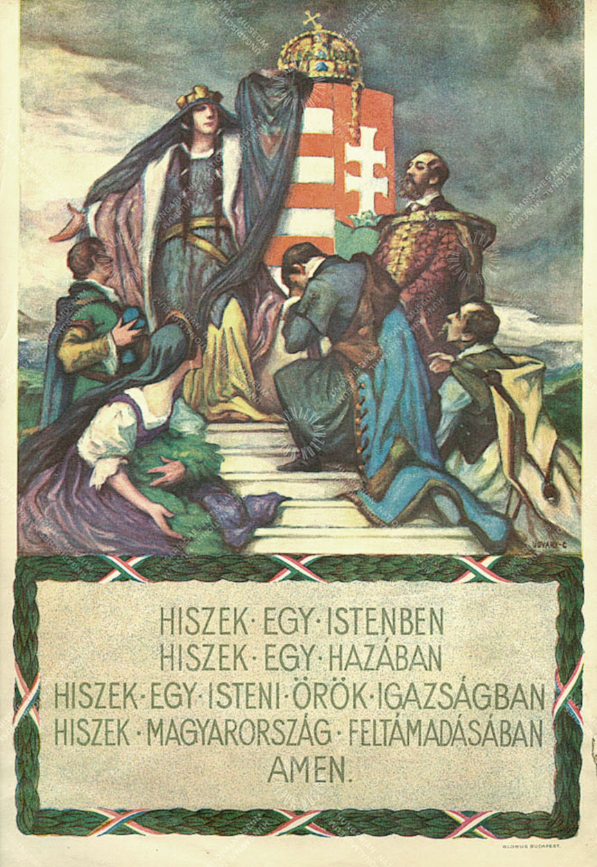 A Magyar Hiszekegyre épülő irredenta plakát 1922-ből